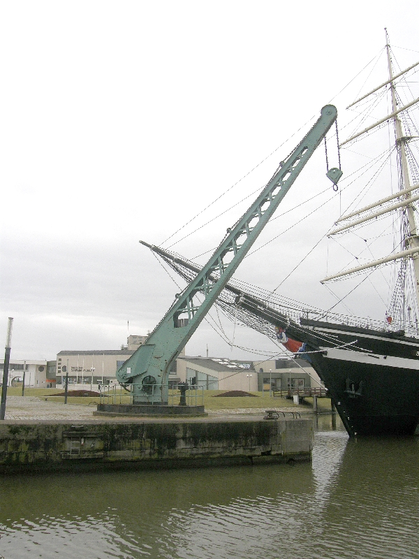 Bilder aus Bremerhaven